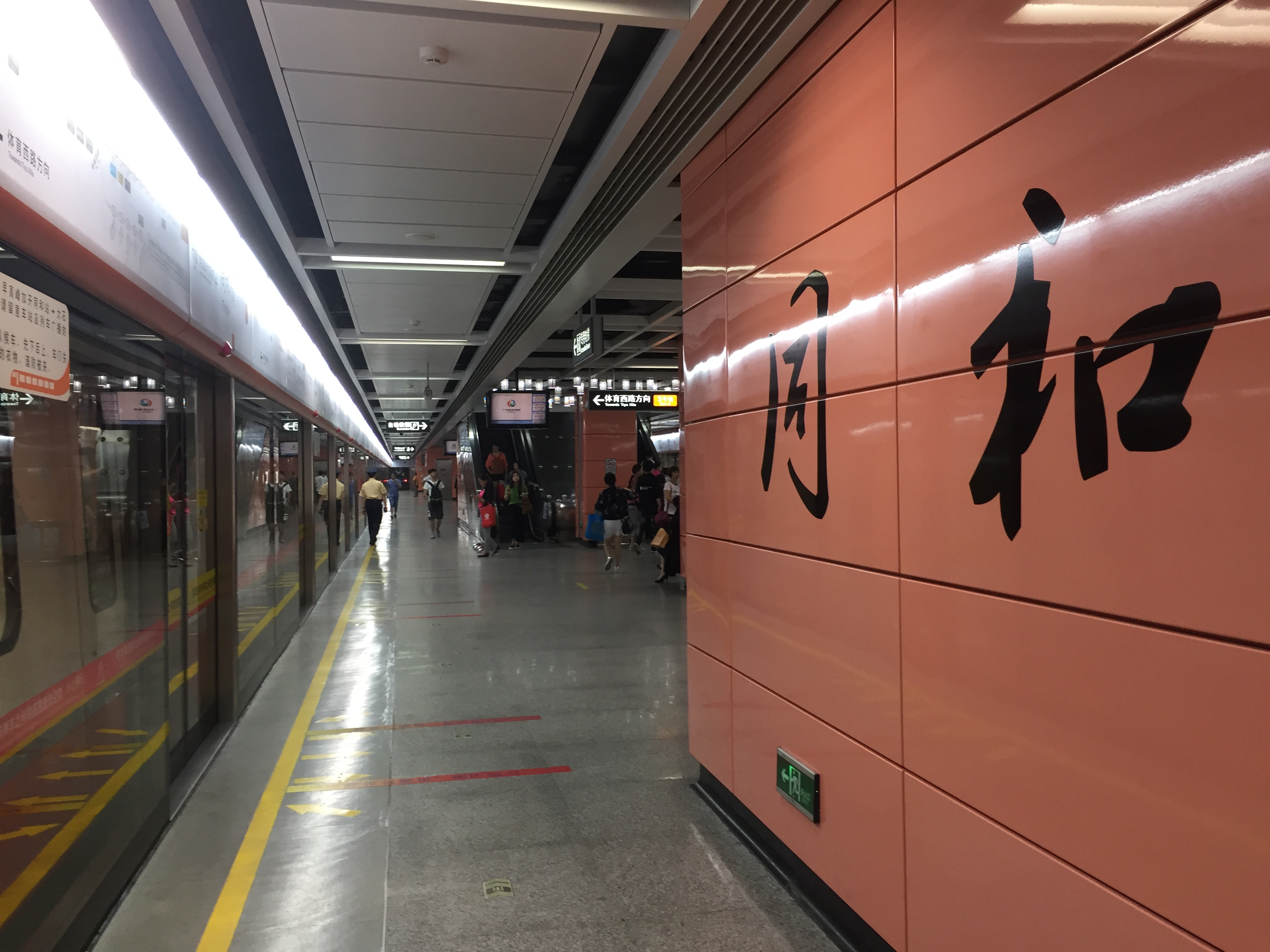 广州地铁同和站